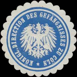 Sealing stamp Title: Königl. Direction des Gefängnisses zu Cöln Description: blau, weiß, geprägt Place: Köln size: 4 cm